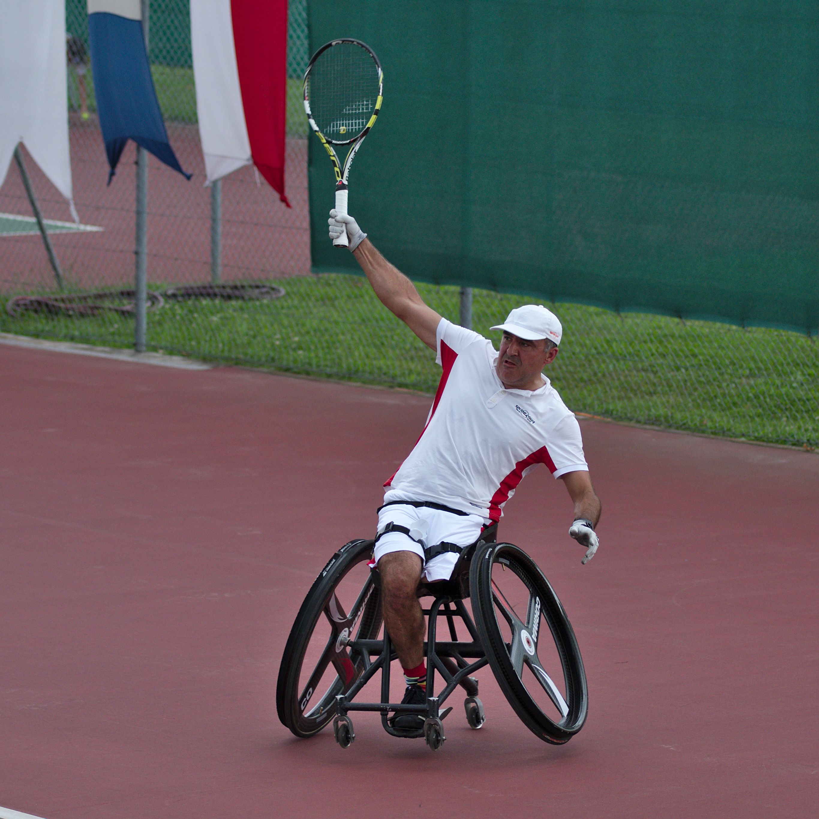 Swiss Open Geneva - 20140712 - Semi final Men - J. Gerard vs S. Houdet